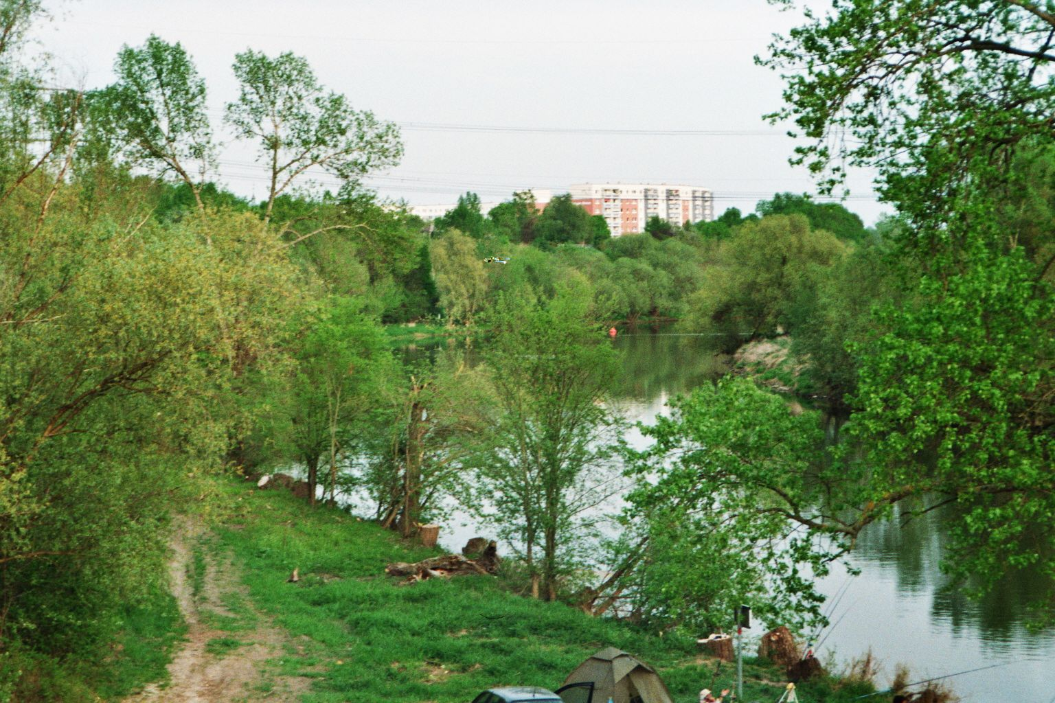 Saale, von der Röpziger Brücke gesehen